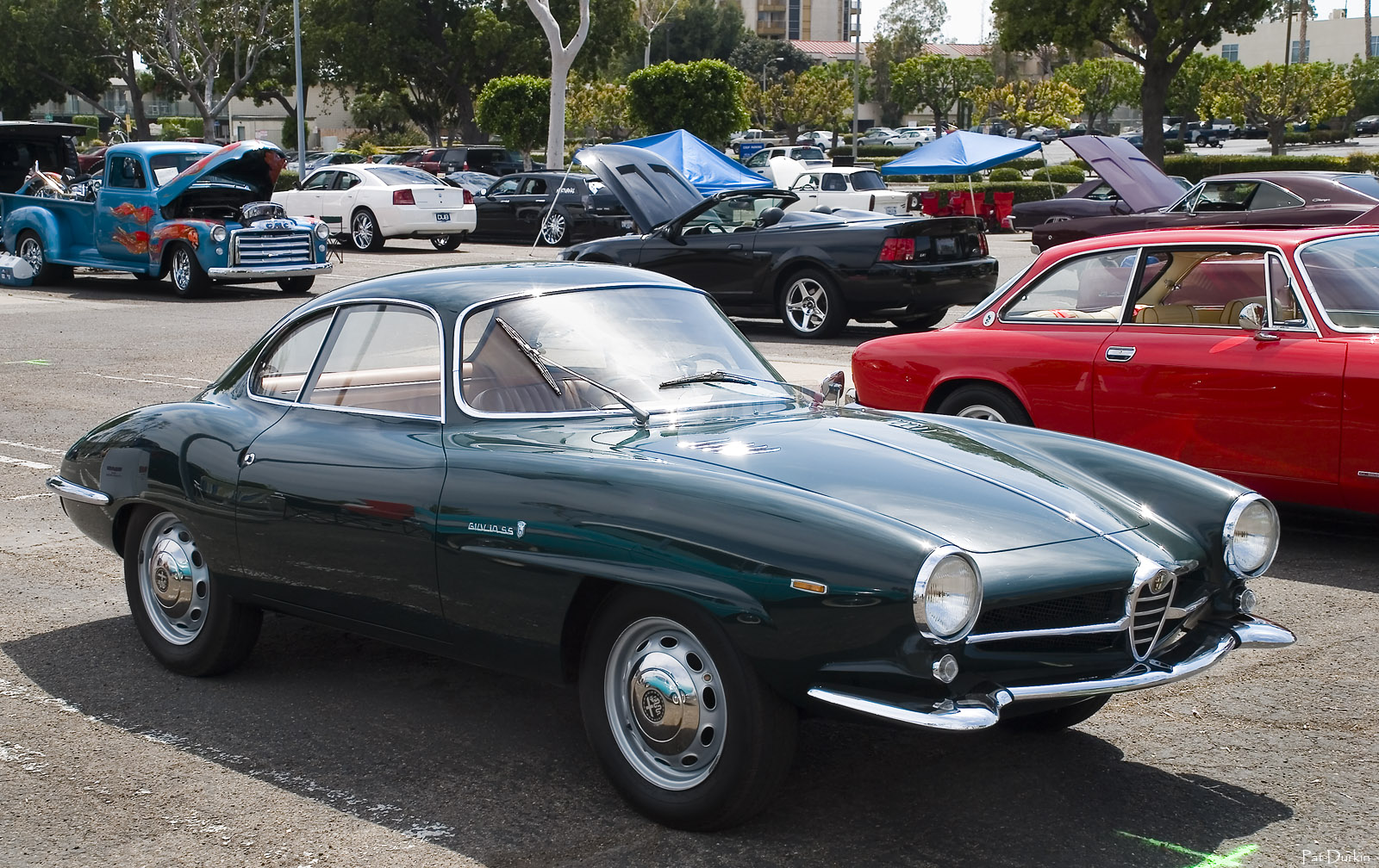 1964 Alfa Romeo Giulia Sprint Speciale